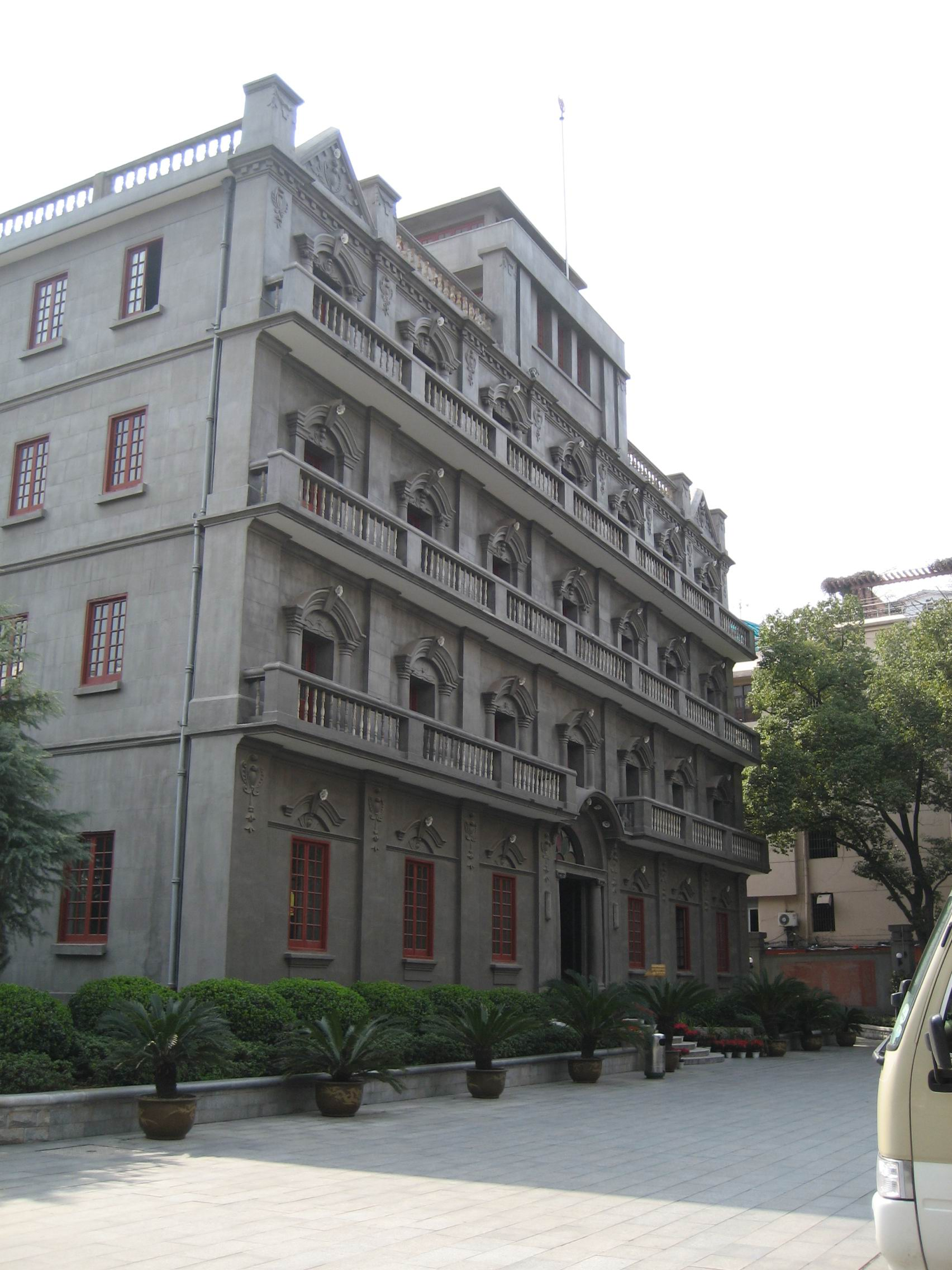 南昌八一起义纪念馆（原江西大旅社），位于中国江西省南昌市。